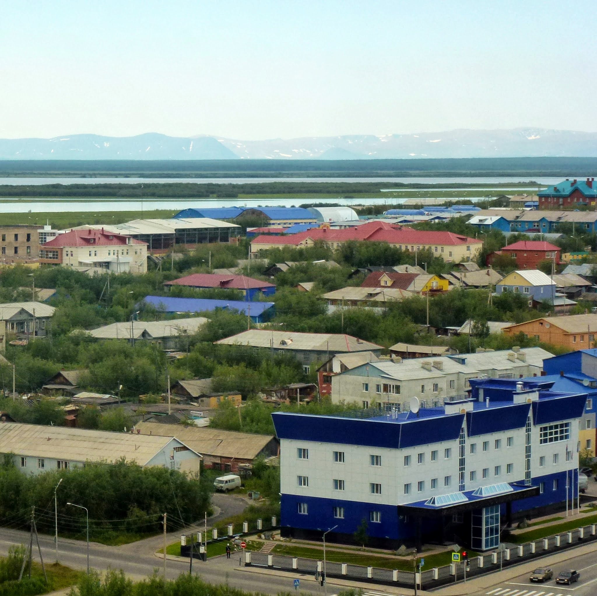 Салехард